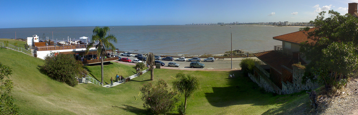 Vista hacia el centro de Montevideo, desde Punta Gorda.